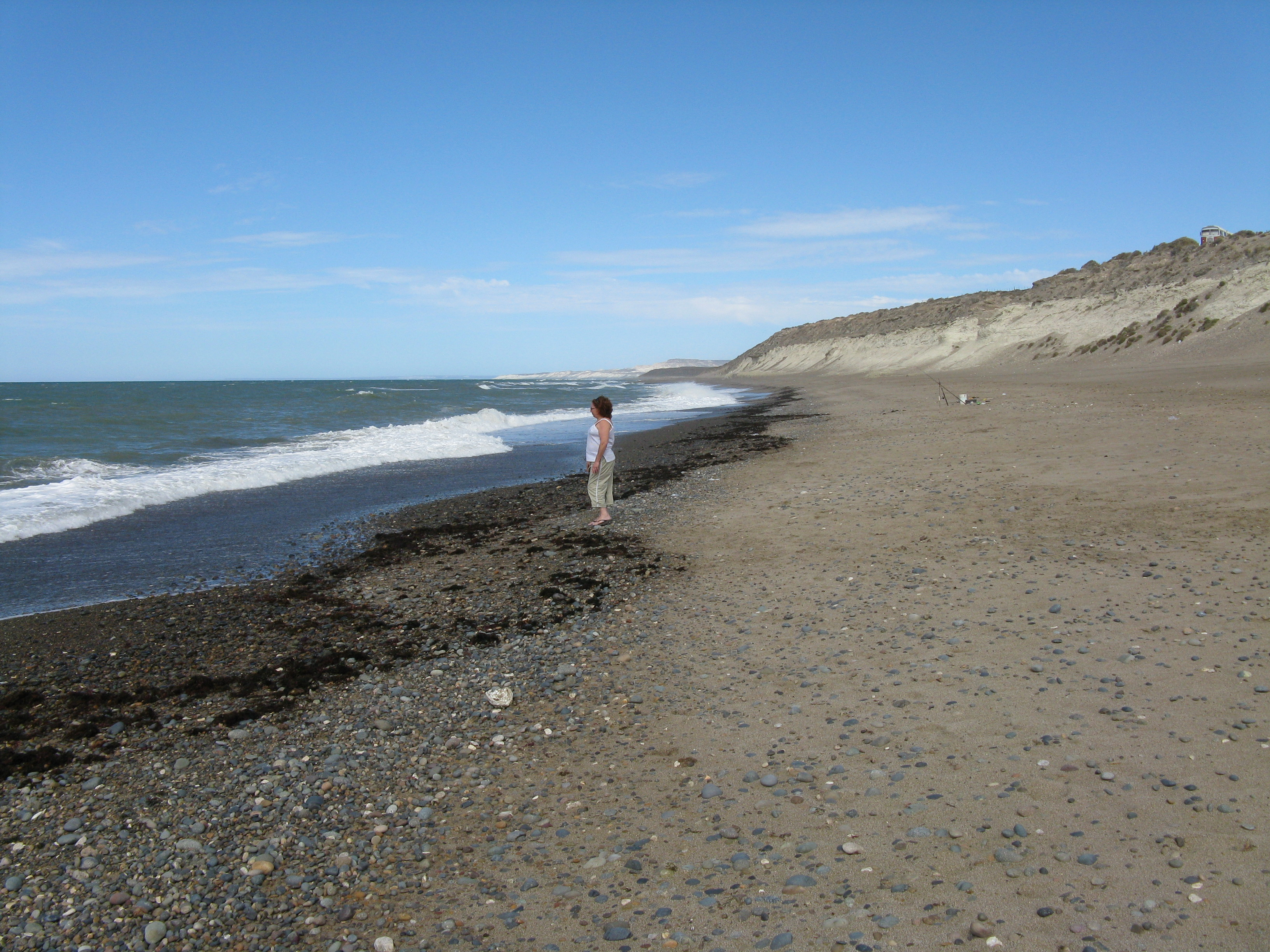 Playa ubicada al sur de la desembocadura del rio Chubut.